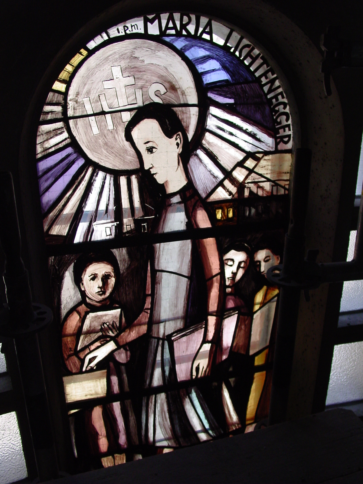 Kirchenfenster von Lichtenegger in der Pfarrkirche Liesing (Wien23) Bild von mir selbst aufgenommen im Sommer 2005